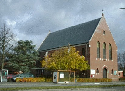 Kerk van de parochie St. Gerebernus op grondgebied Geel Punt